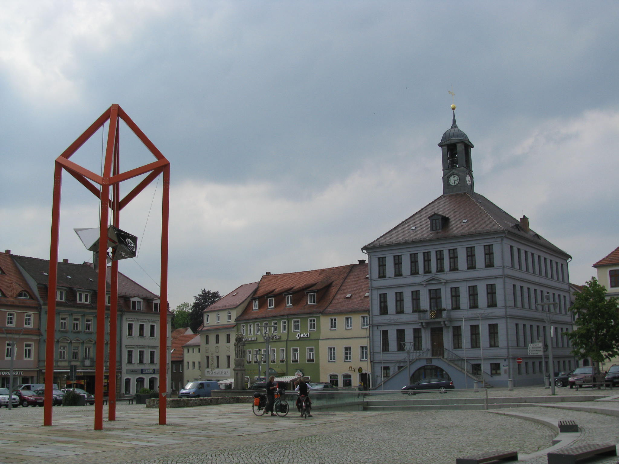 Bischofswerda